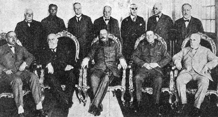 El Golpe de Estado de septiembre de 1924 fue un movimiento militar ocurrido en Chile que generó el fin de la República Parlamentaria y el término de la vigencia de la Constitución de 1833. de izquierda a derecha, sentados: Sres. Rafael L. Barahona, Interior, Almirante Nef, General Altamirano y General Bennet, Miembros de la Junta de Gobierno; Carlos Aldunate S, Relaciones. De pie: Sres. Luis Adán Molina, Vía y Obras; General Ortíz Vega. Guerra; Julio Phillipi, Hacienda; José Bernales, Justicia; Arturo Alemparte Agricultura; Almirante Gómez Carreño, Marina; Alejandro del Río, Higiene y Previsión Social.